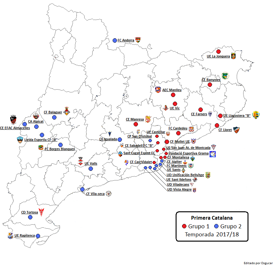 Distribución geográfica de los 36 equipos